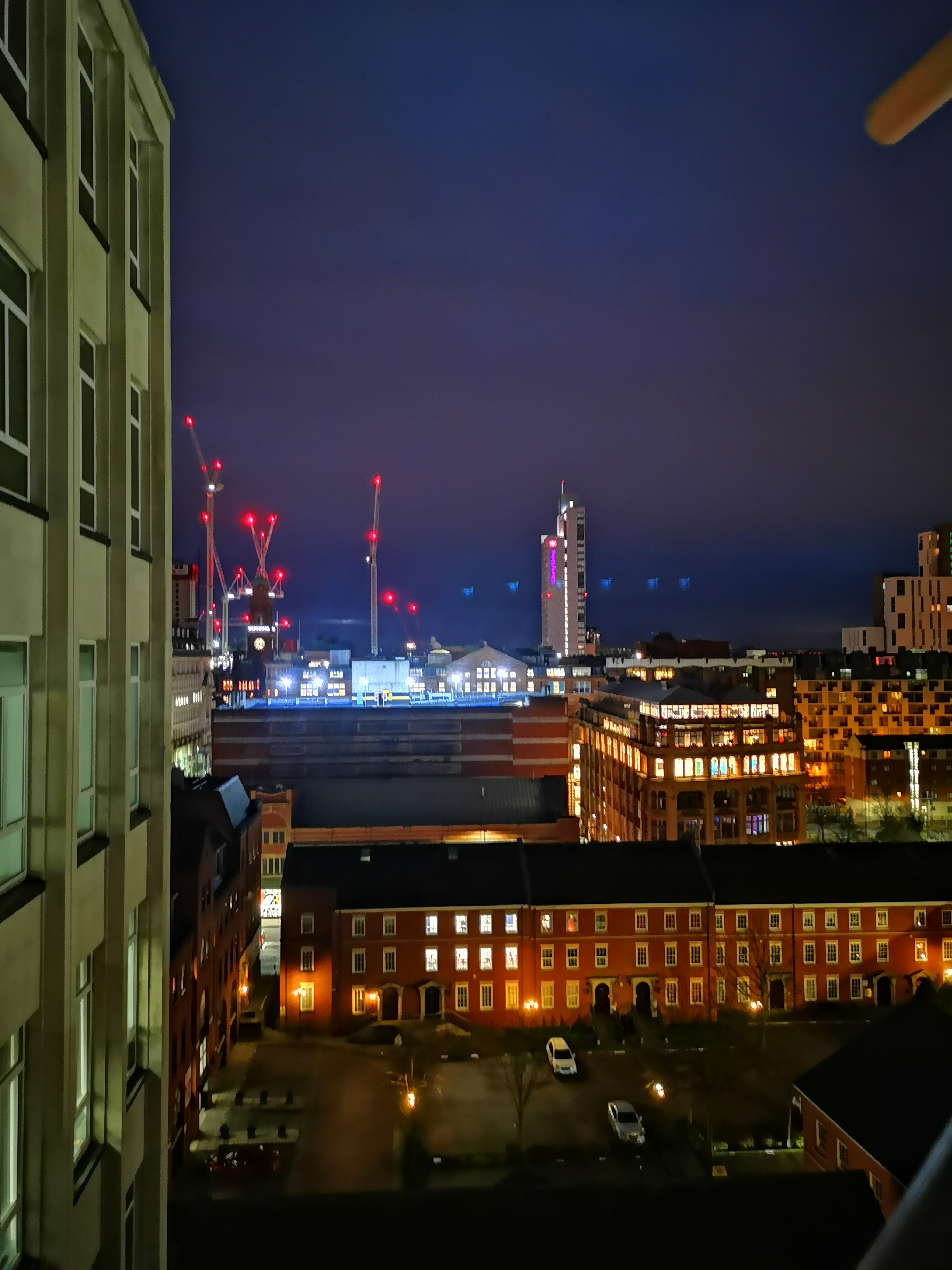 Side Night View